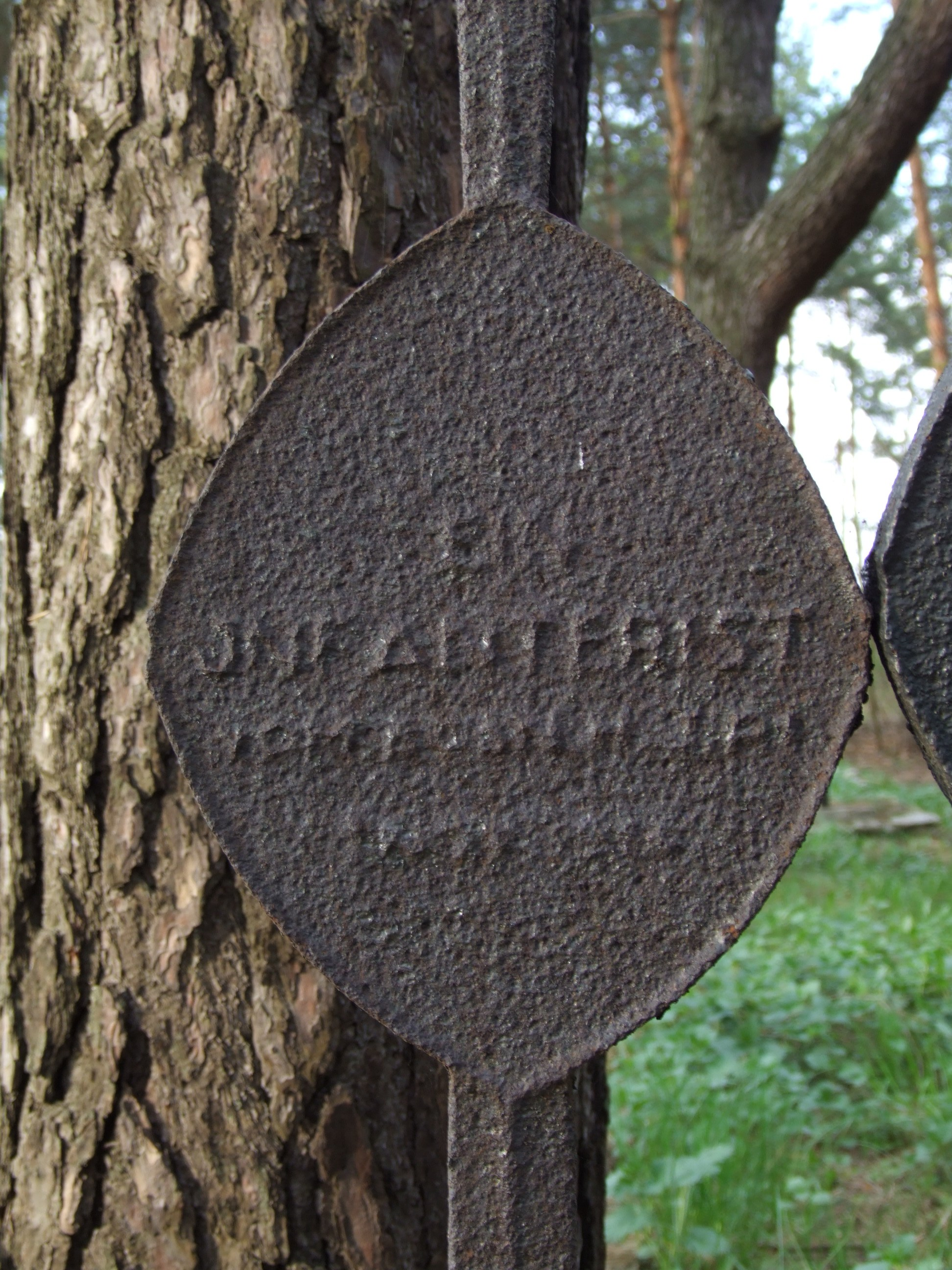 Cmentarz wojskowy w Katowicach - skorodowana tabliczka "Ein Infanterist"